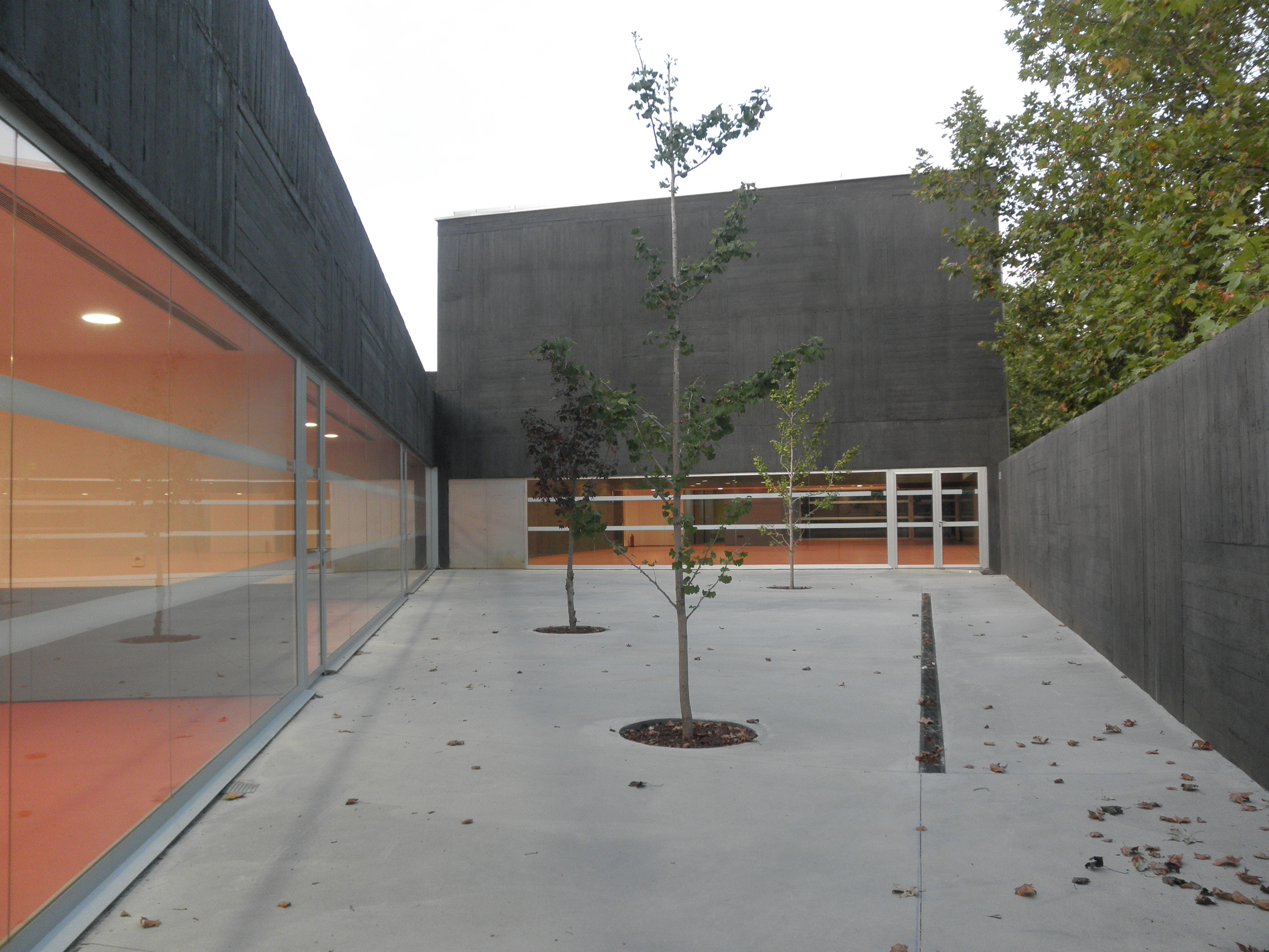 ASPAYM Leon